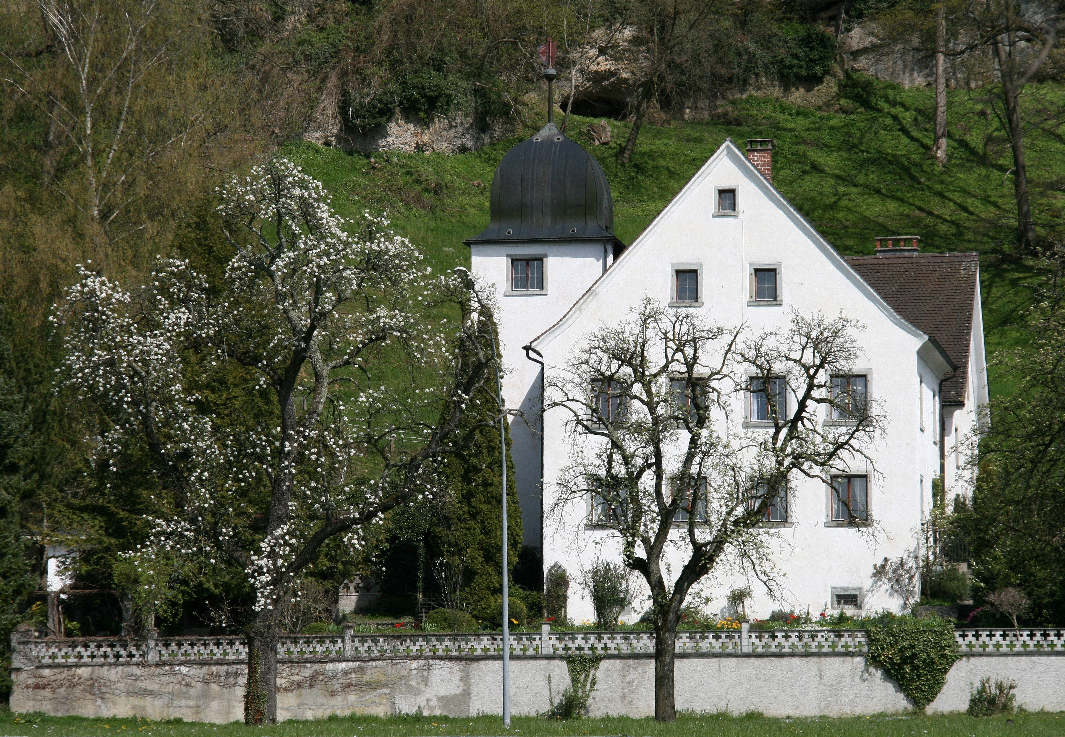 aus dem DEHIO Vorarlberg 1983: ANSITZ Wellenstein, in Hanglage auf halbem Weg zwischen der Bregenzer Klause und Lochau. Erbaut um 1555 von dem 1559 mit dem Prädikat "von Wellenstein" nobilitierten Bregenzer Patrizier Ulrich Reutin. Als Erbgut kurz vor 1599 Übergang an die Bregenzer Patrizier Schmid und weitgehender Innenumbau. Seit 1626 rasch wechselnde Besitzerfolge bis 18. Jh. Ab 1791 bäuerlicher bezw. bürgerlicher Besitz. 1965 renoviert, 1982/83 Generalsanierung. - 2geschossiger Rechteckbau unter Satteldach, regelmässige Achsen durch einfache Viereckfenster in gefalztem Rahmen. Aus der NO-Ecke ausspringend 3geschossiger quadrat. Turm mit welscher Haube. Ostseitig rundbogiges Eingangsportal, am Schlußstein leerer Wappenschild mit Freiherrenkrone, um 1700, 1965 durch Kopie ersetzt. *** in Wellenstein Nr.1, Lochau, Vorarlberg.